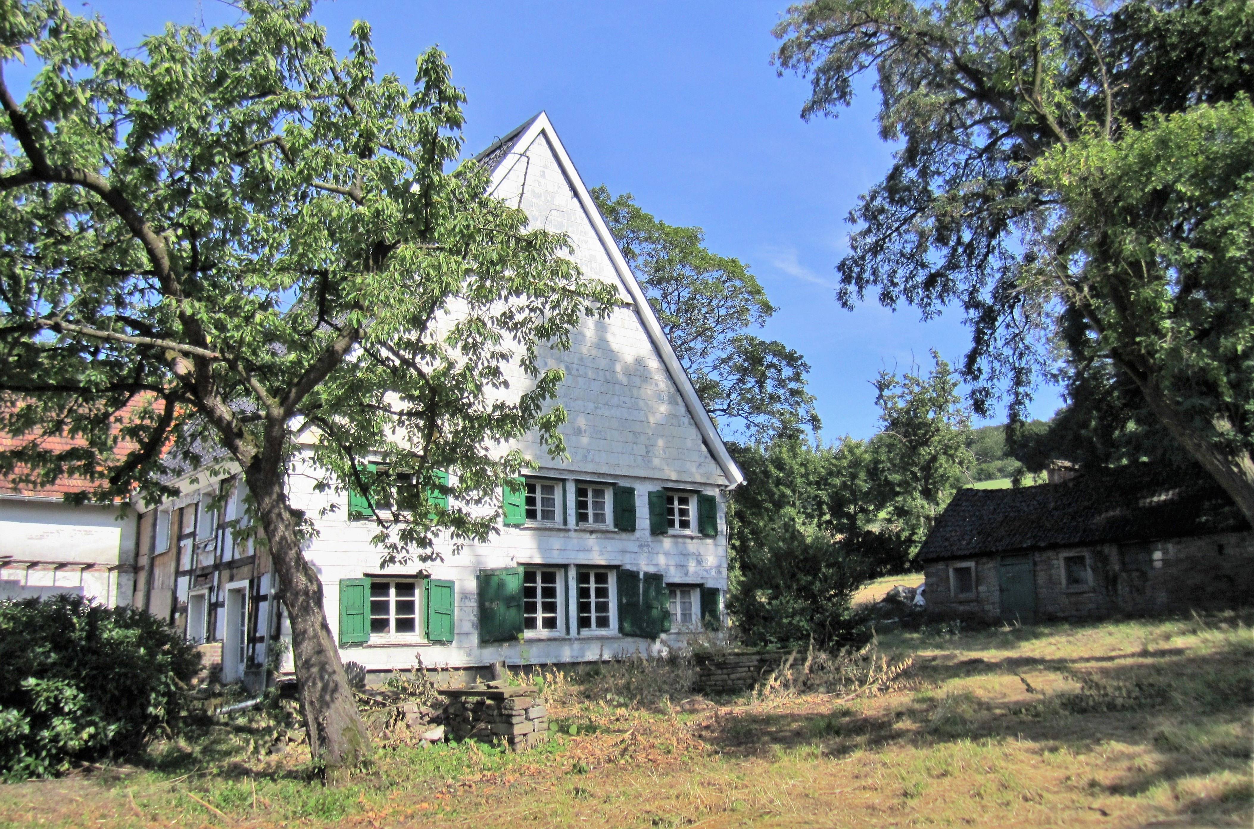 Denkmalgeschütztes Hofgut in Hagen-Vorhalle, Aehringhausen 5. Ehemals in der Bauerschaft Vorhalle ein Lehnsgut der Adelsfamilie von Volmarstein. 1486 wird im Schatzbuch der Grafschaft Mark in der Vorhelder Burschop mit 19 Steuerpflichtigen ein Peter to Oyrdynkhusen mit einer Abgabe von vier Goldgulden genannt. Ein Hektar alter Laubholzbestand, Teich und Obstwiese gehört zum geschützten Landschaftsbestandteil „Hof Aehringhausen“, als ein Teil vom Landschaftsschutzgebiet „Huelsbergbach“. This is a photograph of an architectural monument.